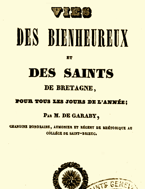 Livre publié en France en 1839